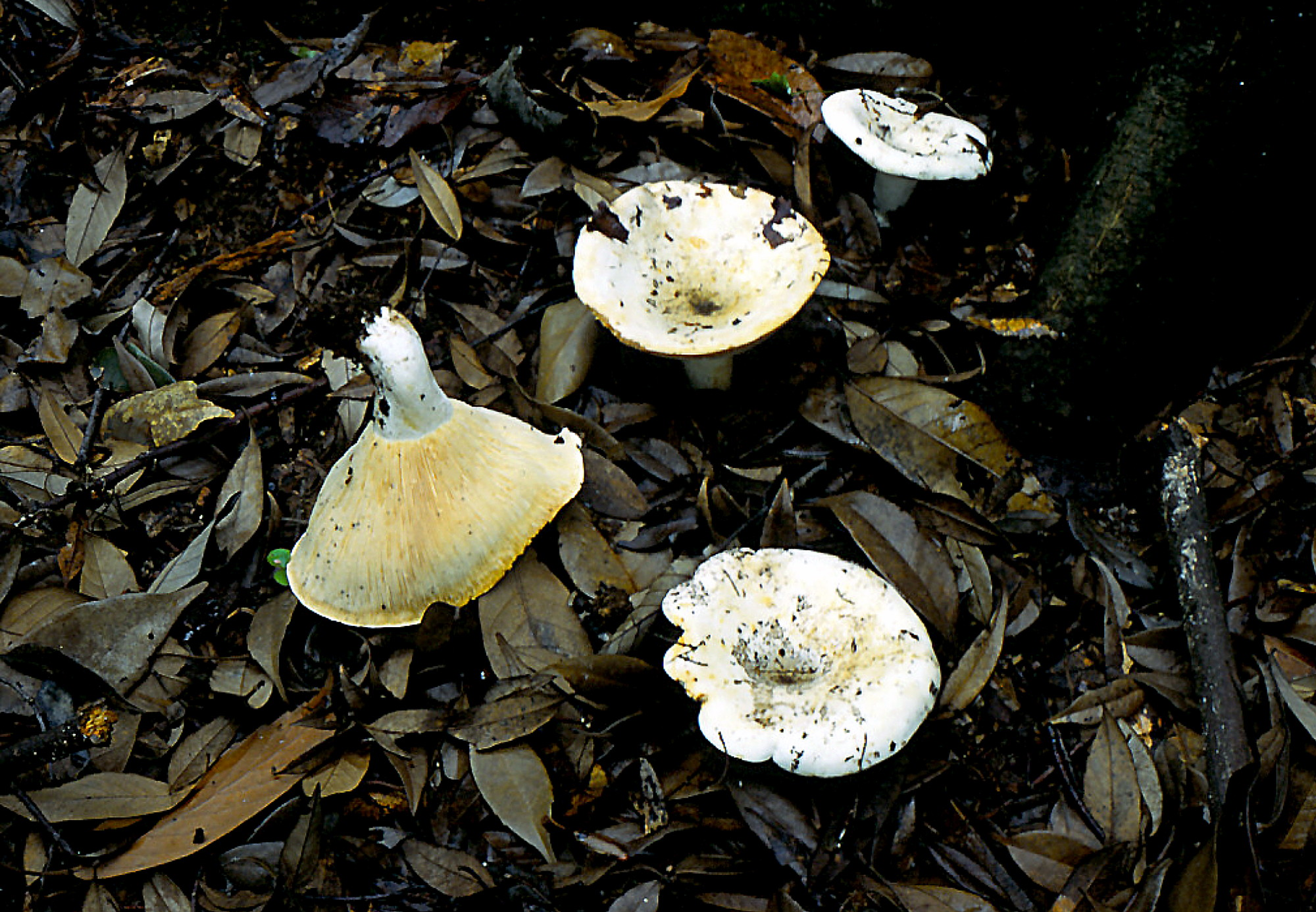 Russula japonica 2000-07 (Japon) シロハツモドキ Fausse russule sans lait (faux lactaire blanc)